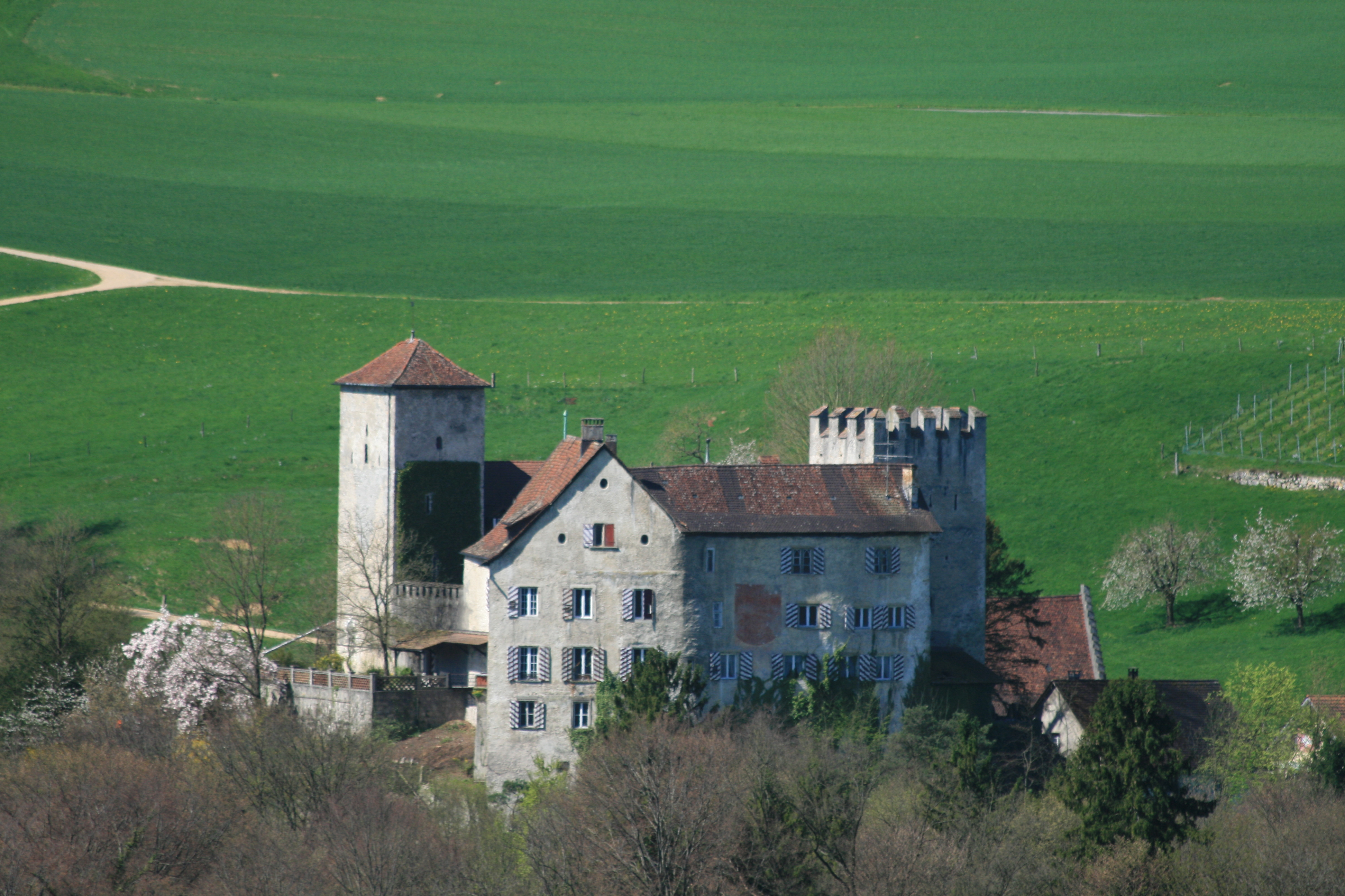 Schloss Wildenstein, Veltheim AG